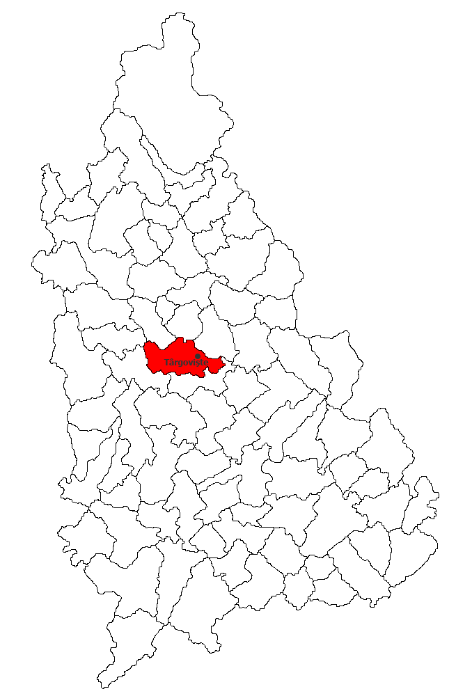 Categorie:Hărţi ale judeţului Dâmboviţa